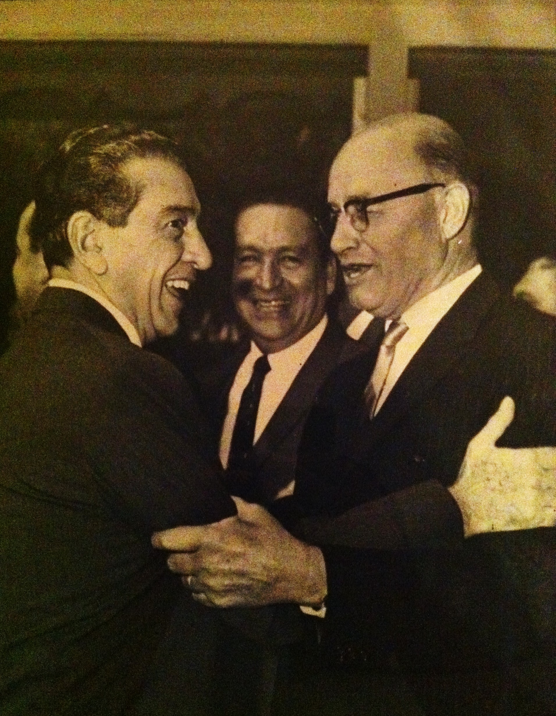 Manuel Suarez